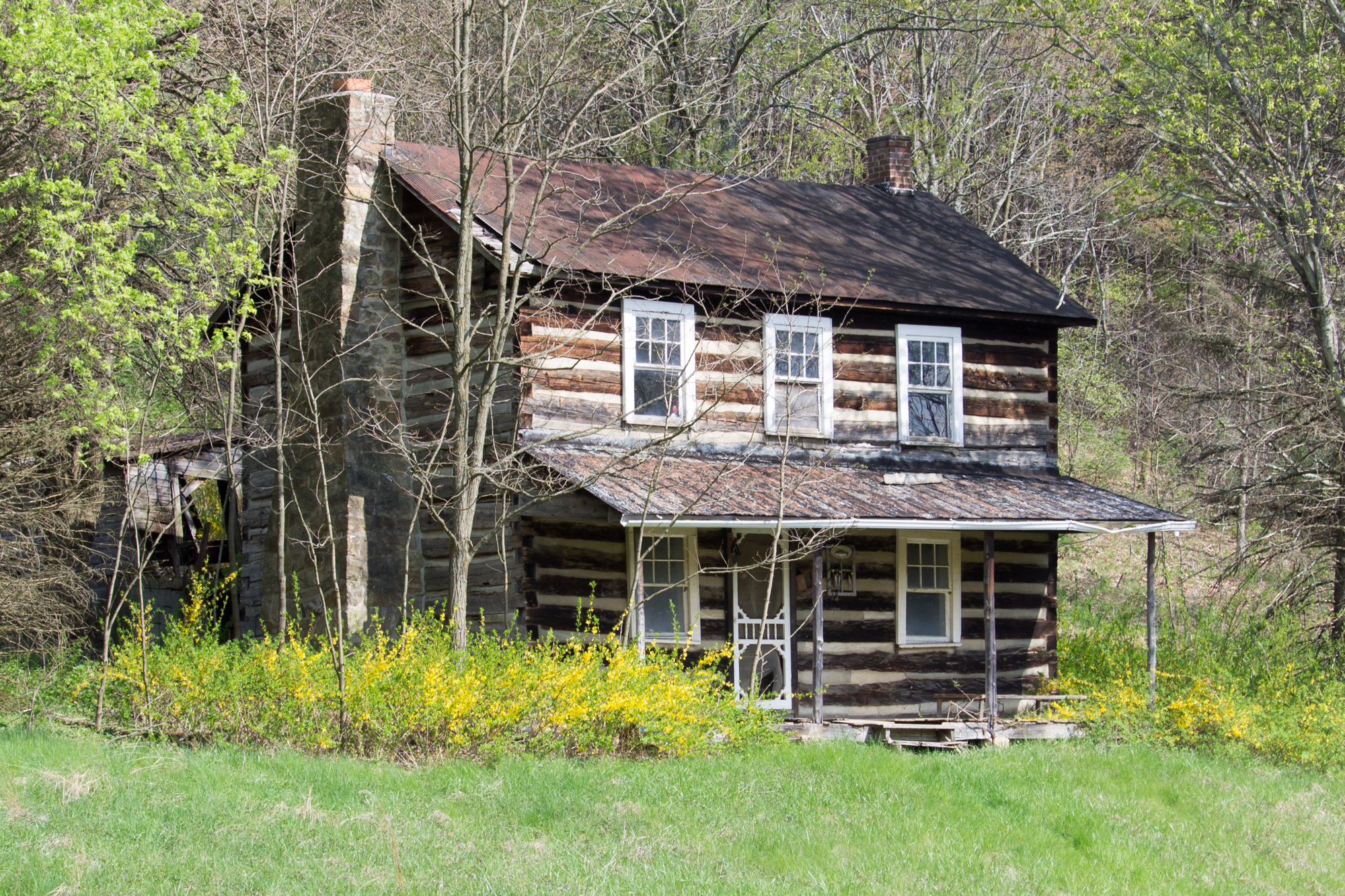 Harrisonville, Pennsylvania